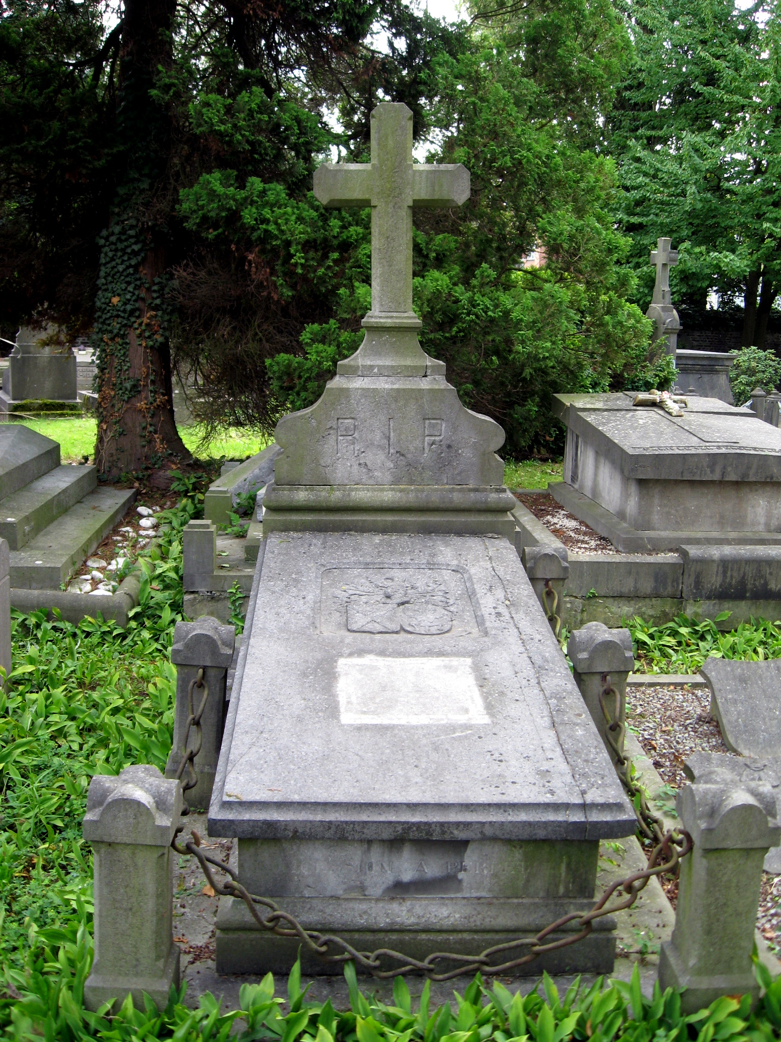 Grafmonument van burgemeester en provinciegriffier Armand Roelants op het Oud Kerkhof van Hasselt